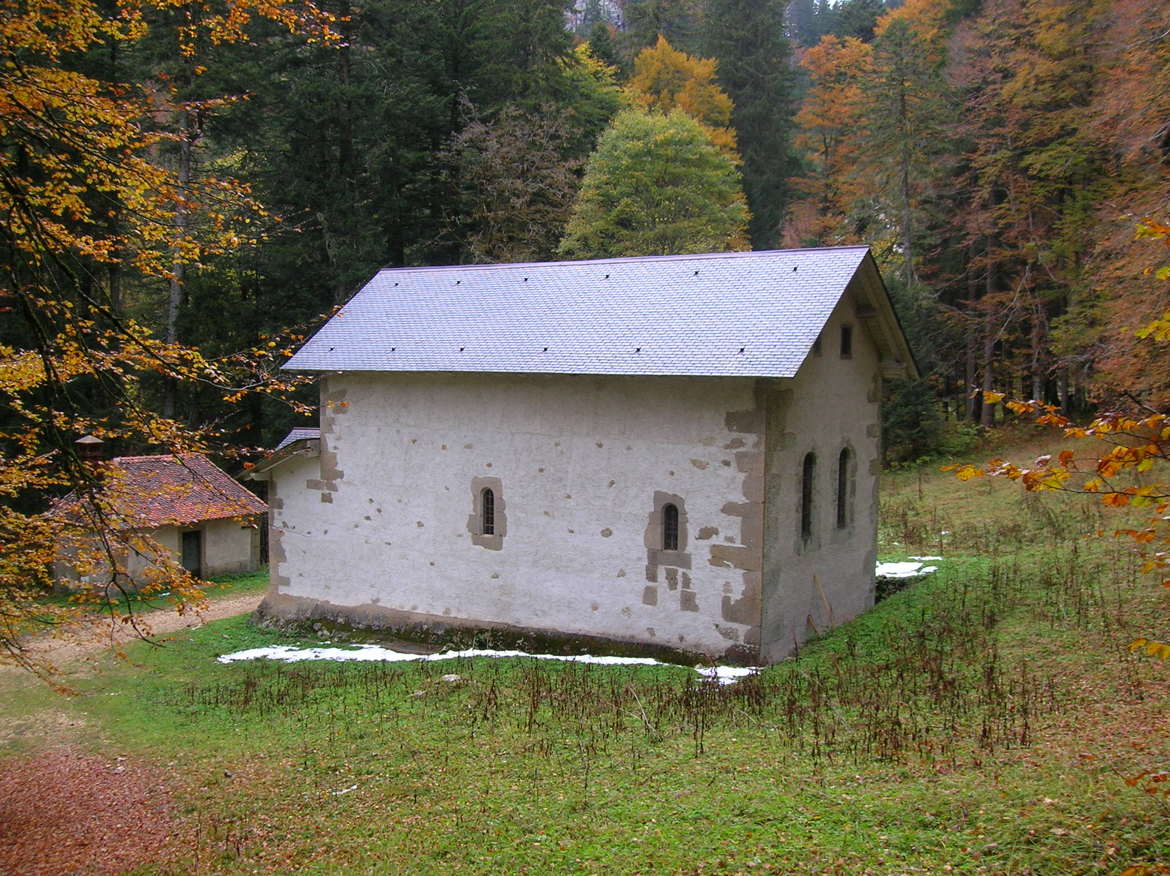 Notre Dame de Casalibus, Grande-Chartreuse, Saint-Pierre-en-Chartreuse.